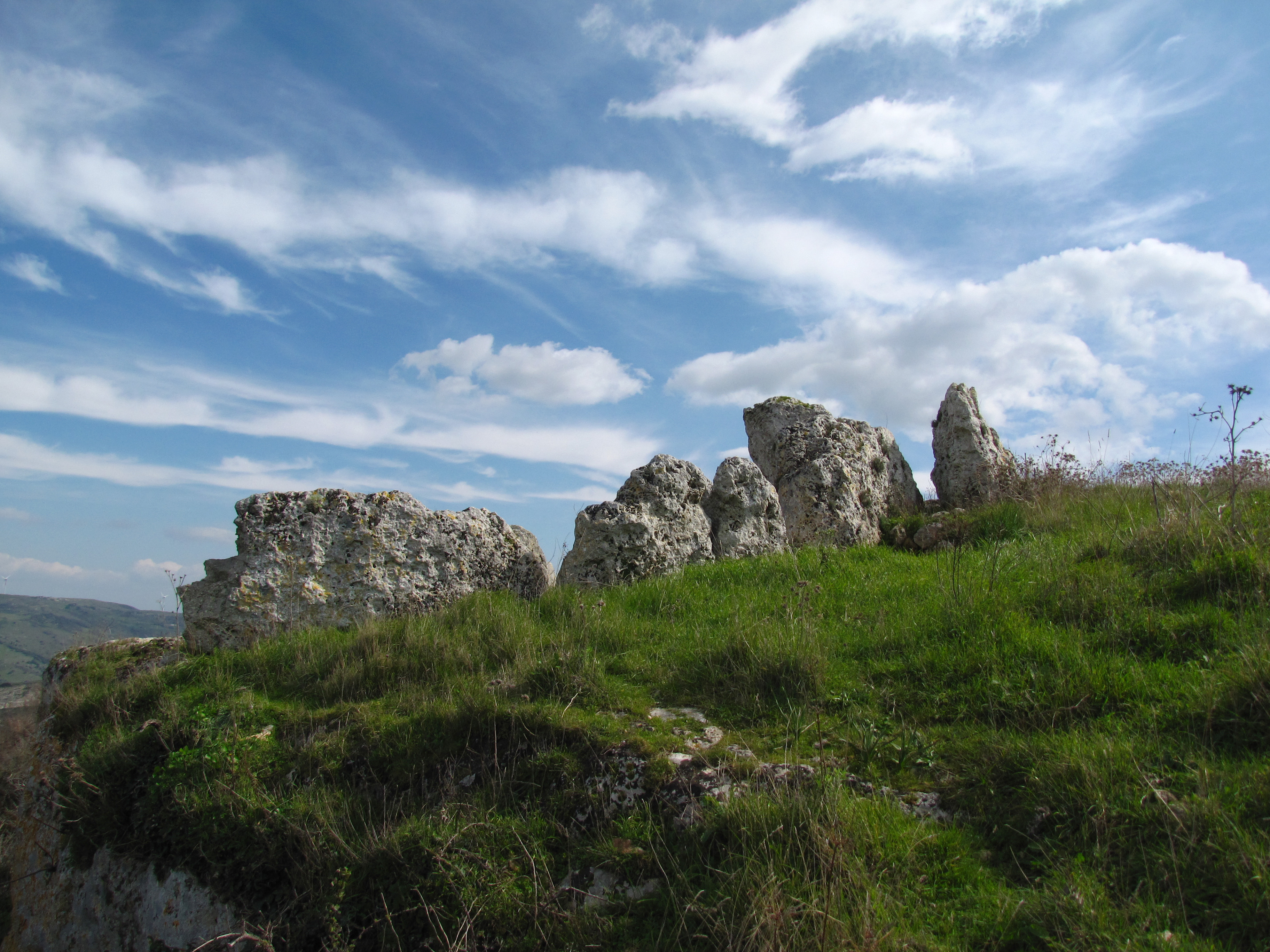 Il circolo megalitico.